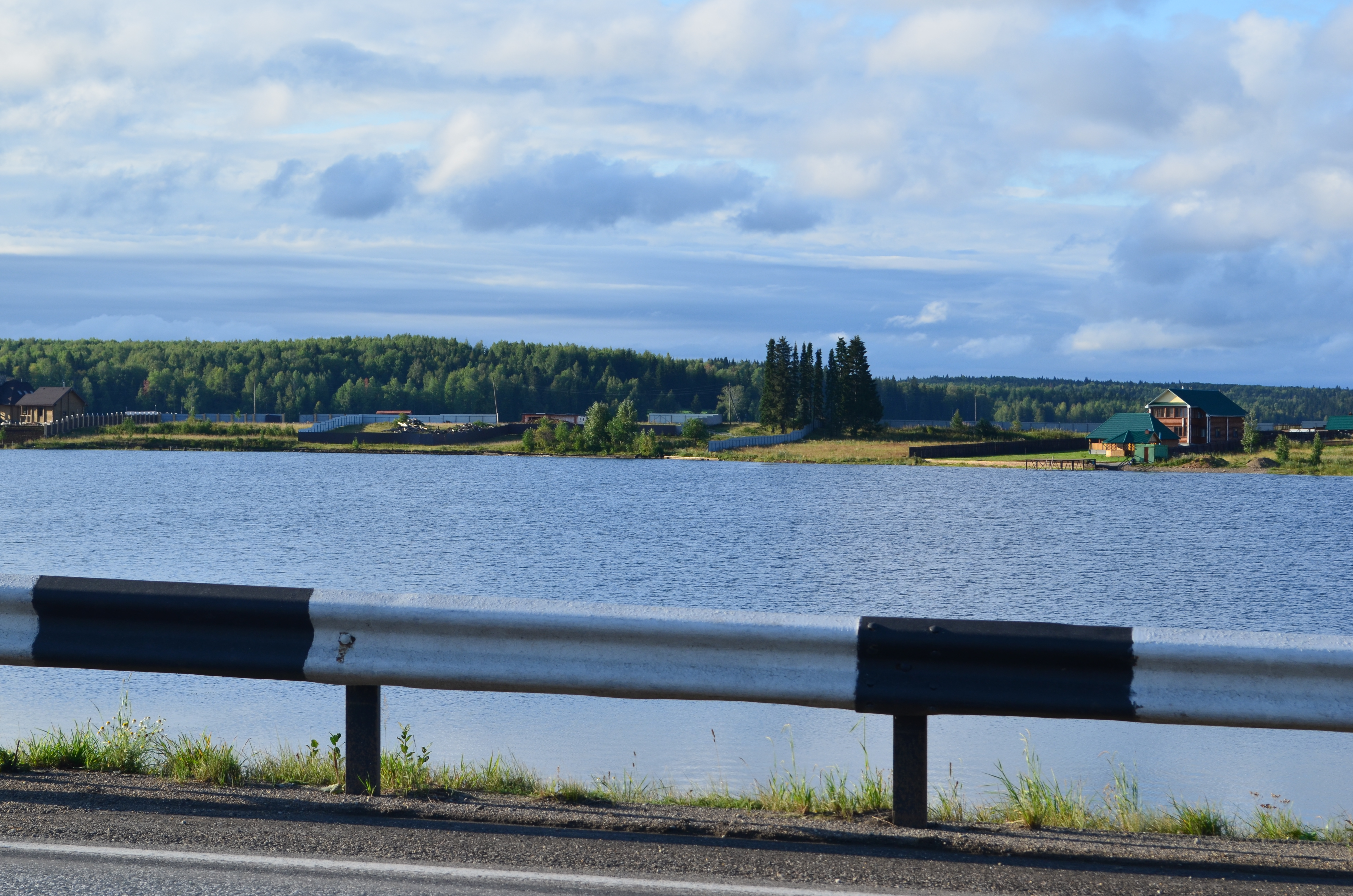 Усть-Шалашная